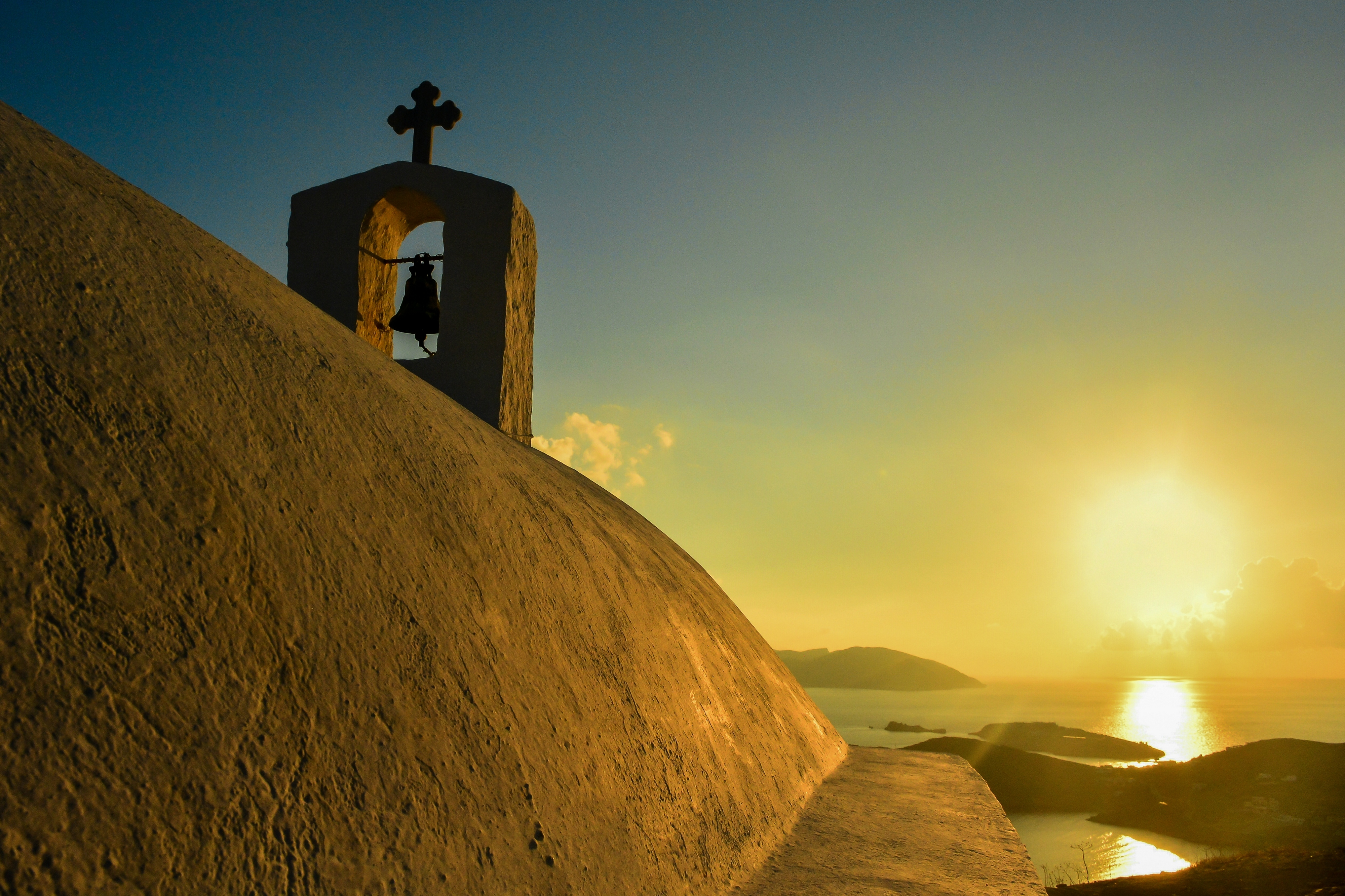 Χώρα Ίου«Χώρα Ίου»